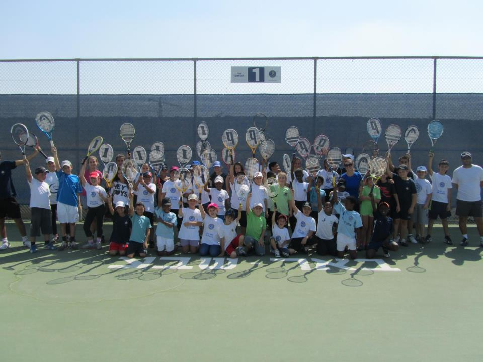 Israel Tennis Center - Beers Sheva